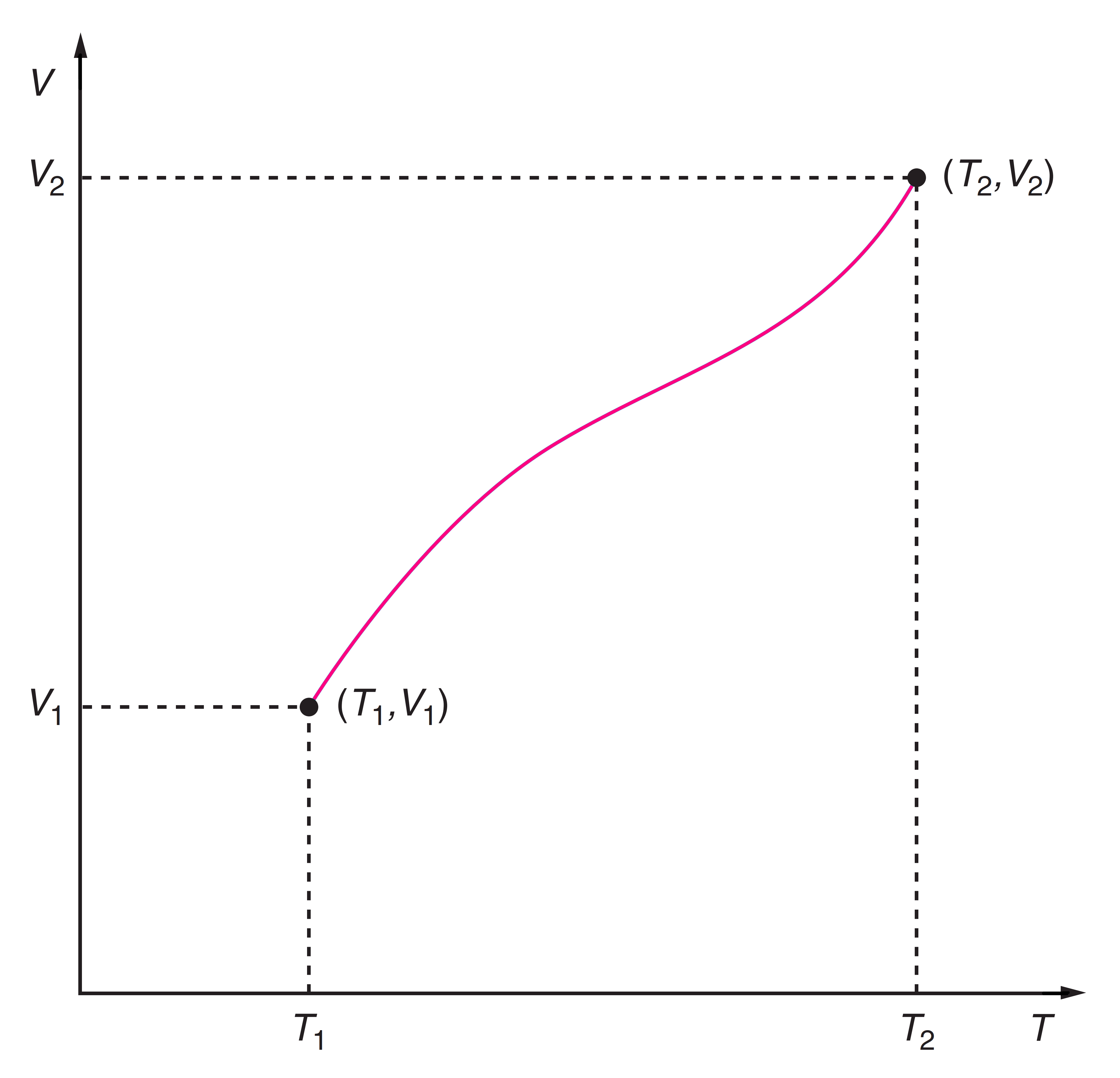 Путь процесса в координатах T, V